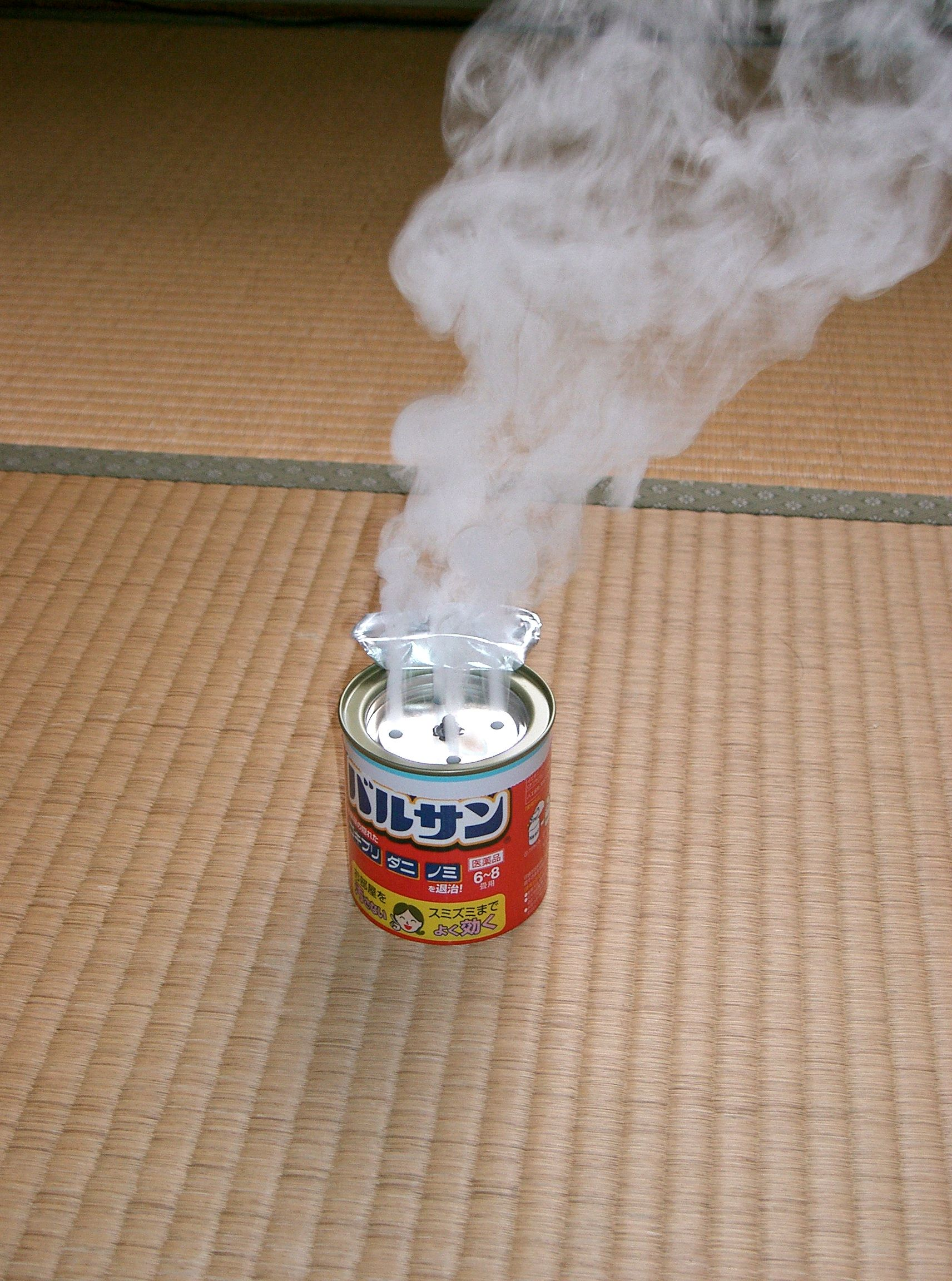 燻煙剤